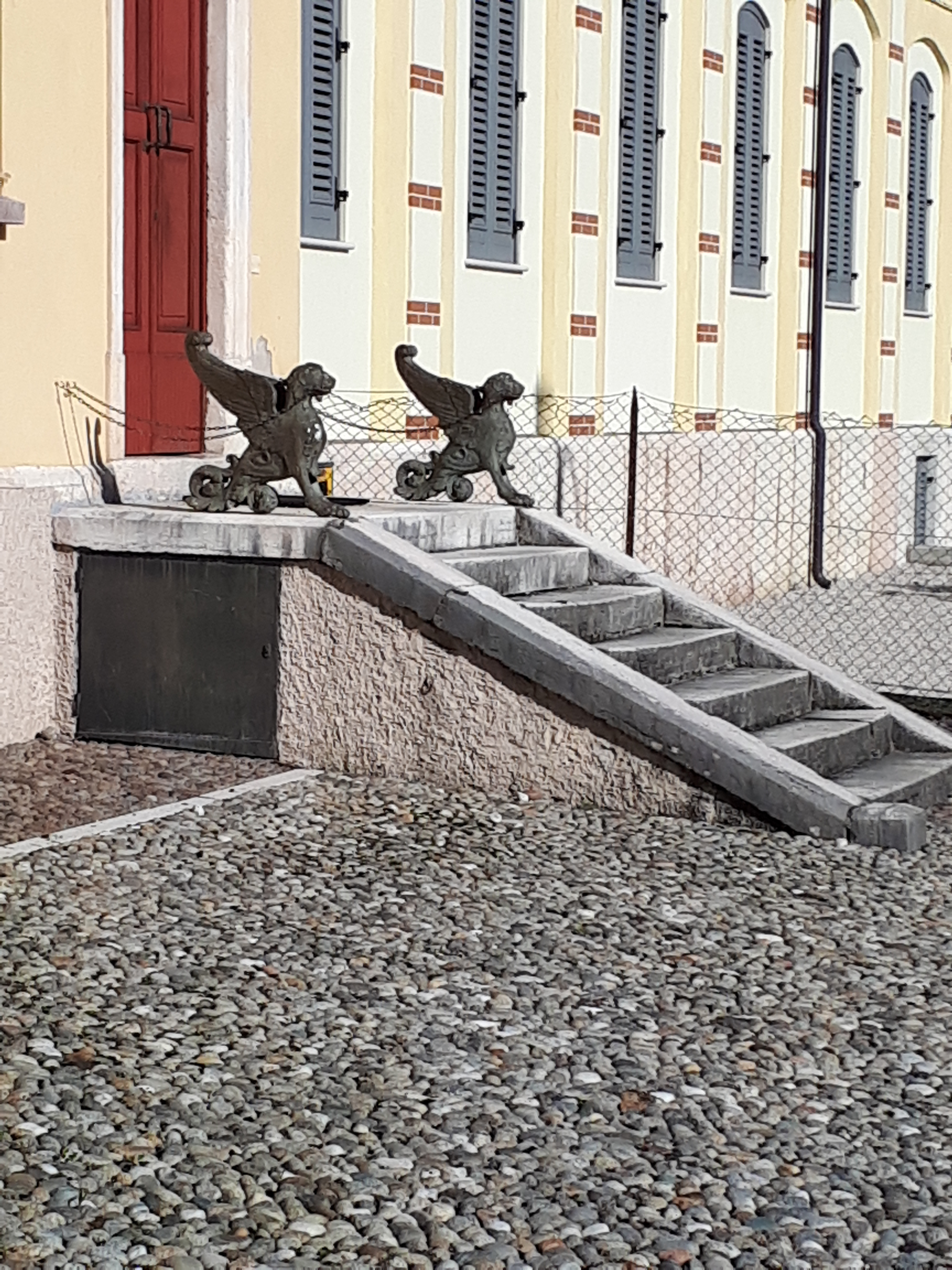 Particolare della scuola di orticoltura e pomologia a Schio